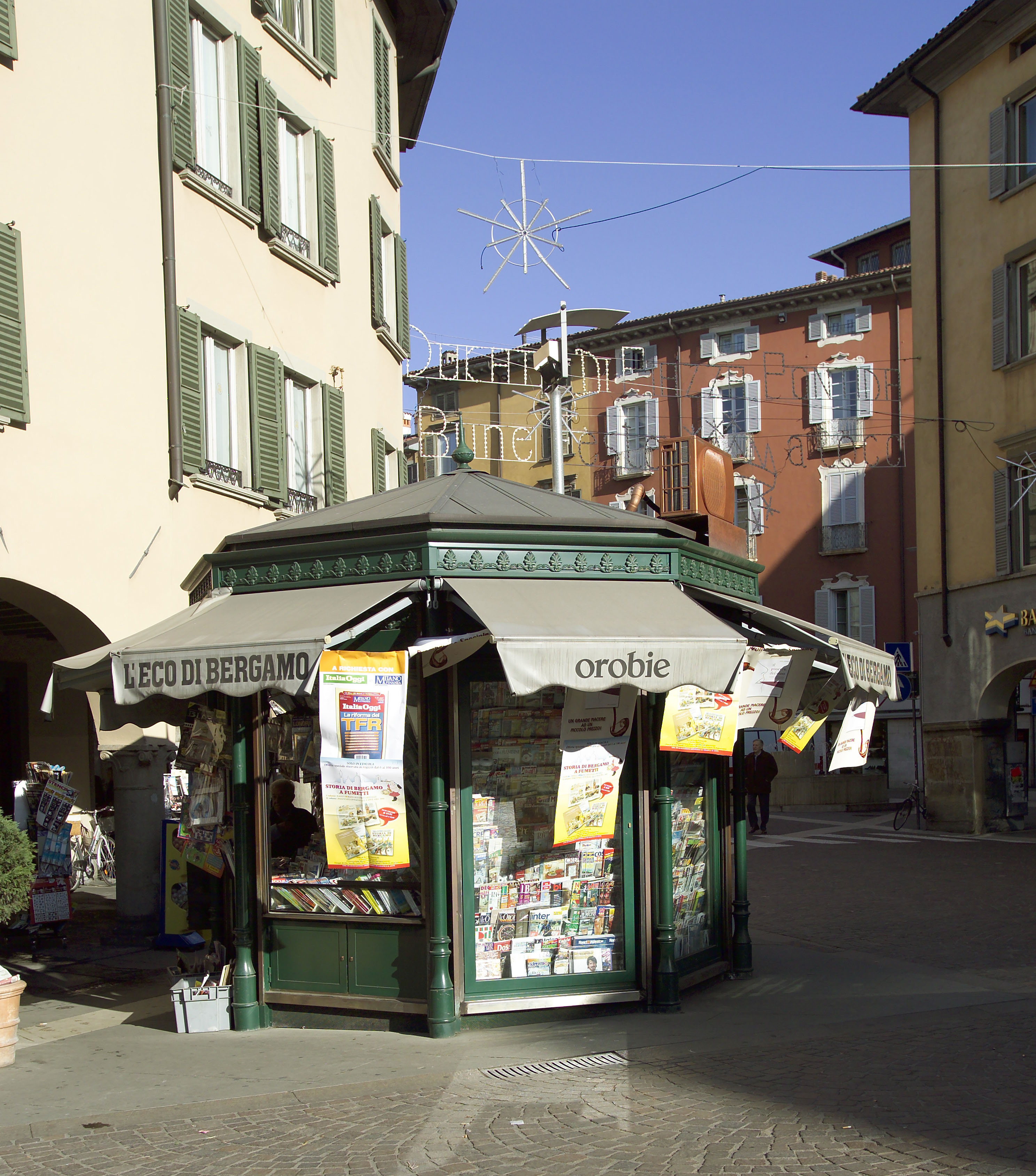 edicola eco di bergamo e orobie